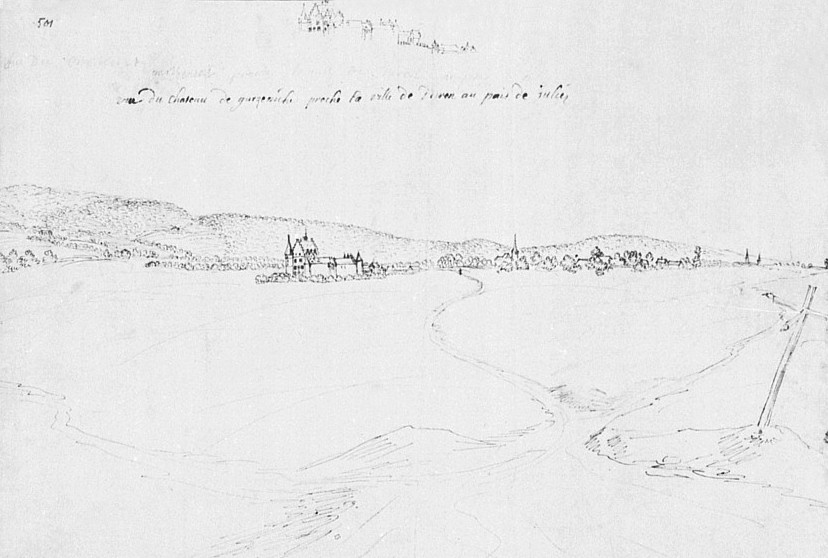 Federzeichung mit der Burg Gürzenich im heutigen Düren